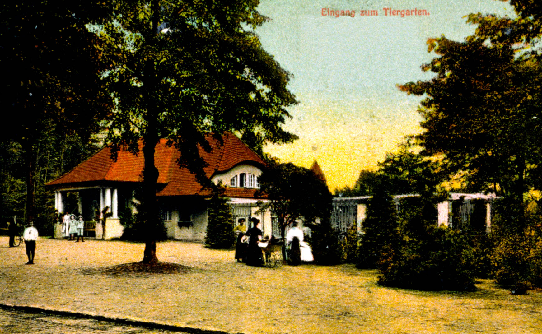 Historische Postkarte des Rostocker Tiergartens. Zu sehen ist der Eingang in den Zoo